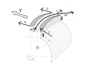 Impuls und Stromfaden